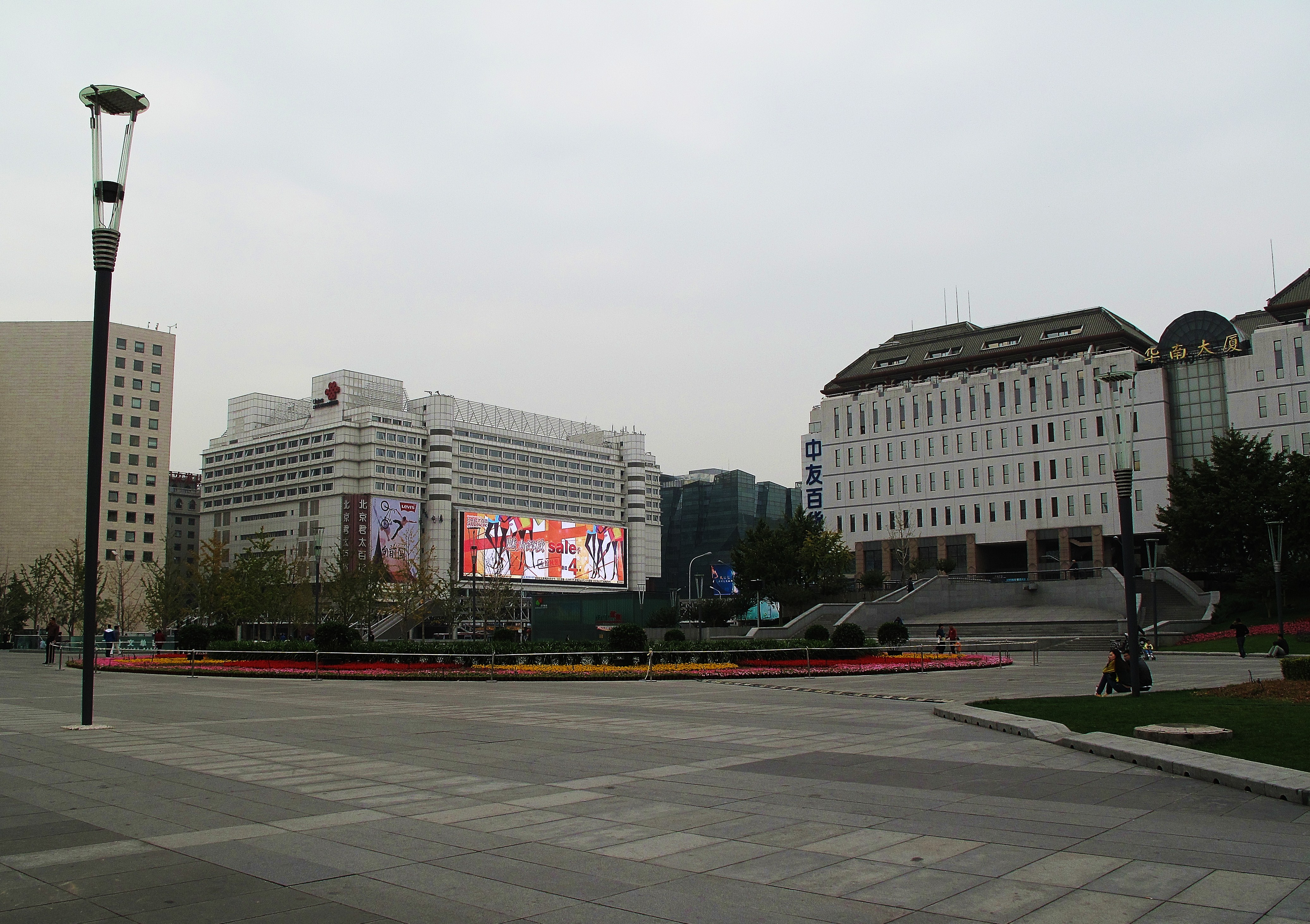 Xidan Culture Square